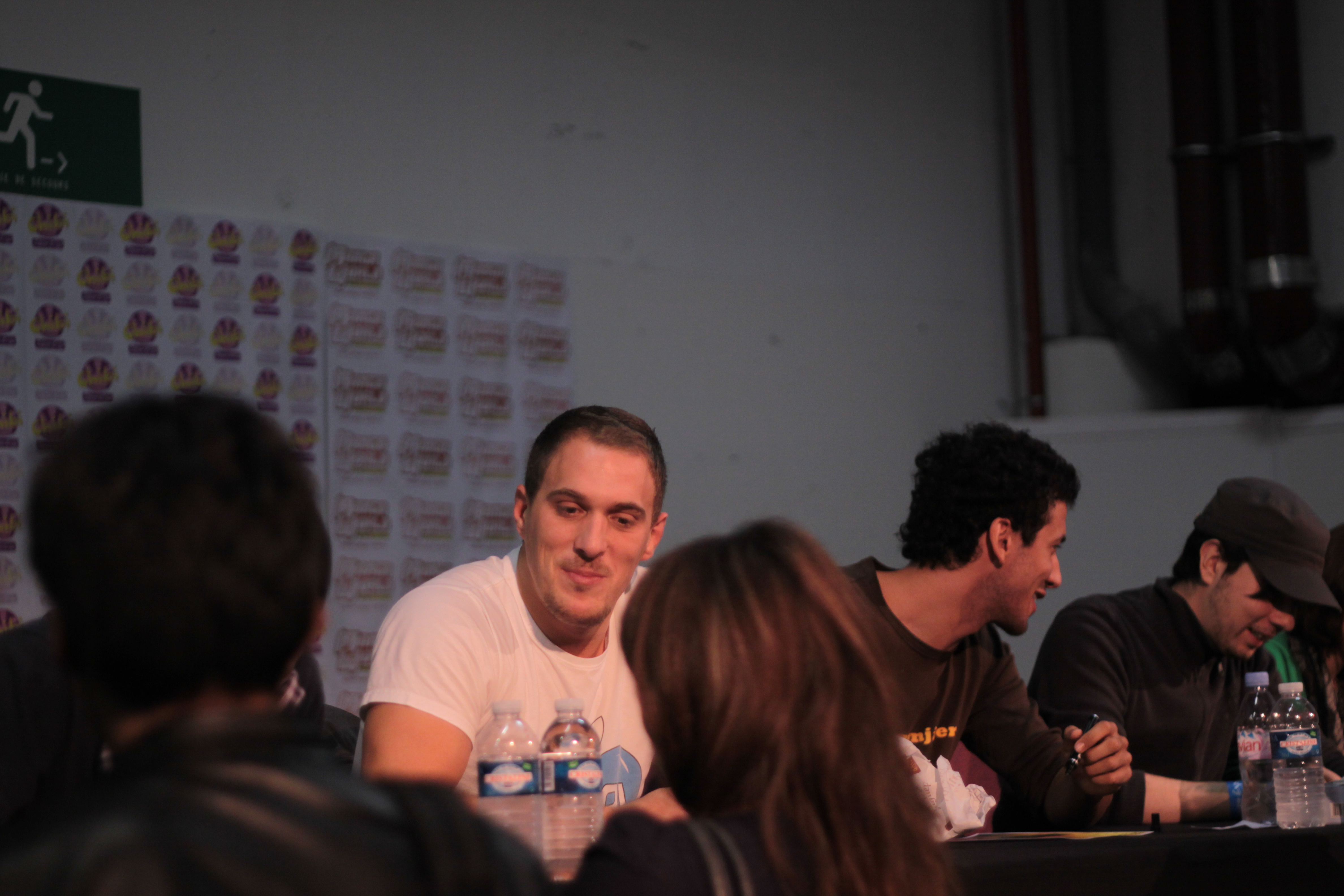 Acteurs de la série Le Visiteur du futur à une dédicace. Chibi Japan Expo 2010.